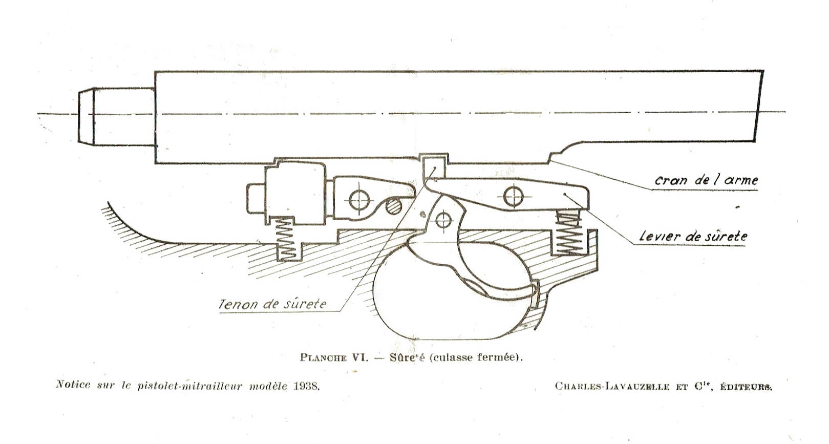 schéma de montage du pistolet-mitrailleur MAS 38 , sûreté